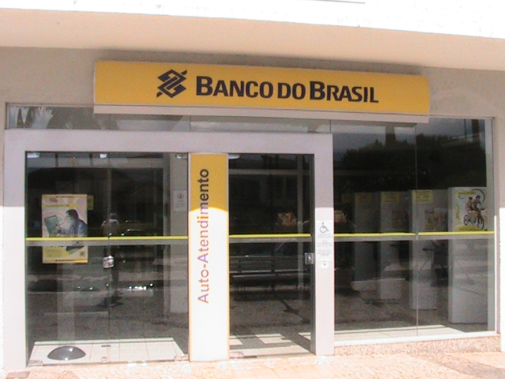 Banco do Brasil na Praça Governador Valadares, no Centro de São Vicente de Minas, Minas Gerais, Brasil.